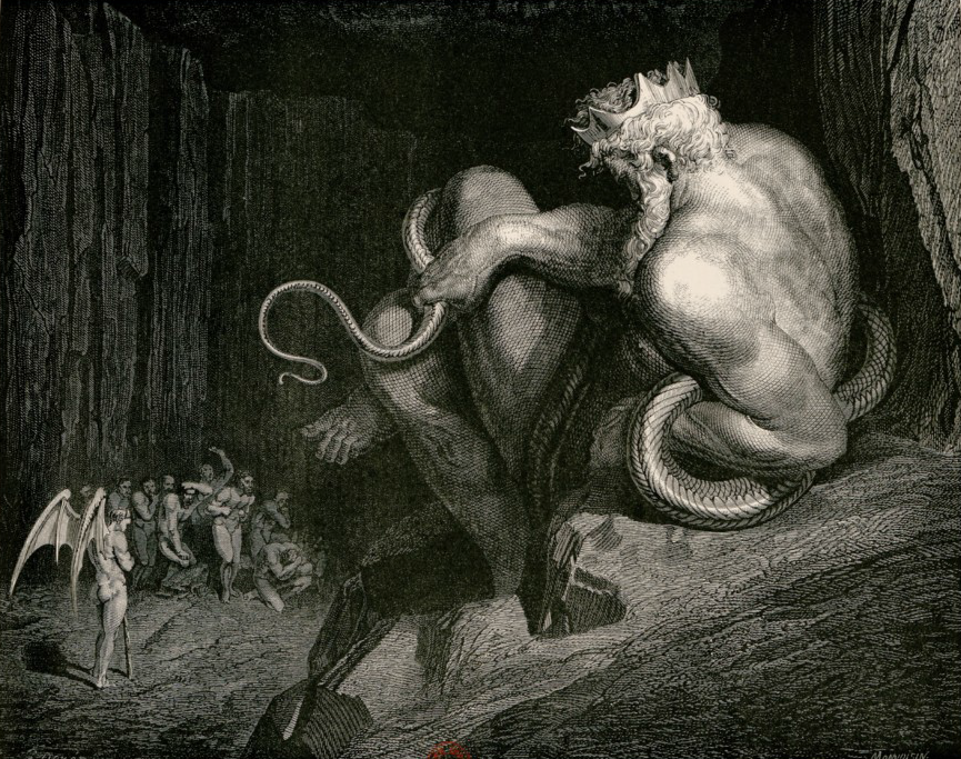 Dessin de Gustave Doré, gravure sur bois de Gaston Monvoisin dans La Divine Comédie - l'Enfer de Dante (édition de 1861)